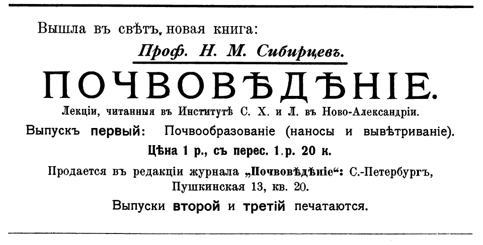 Реклама книги Н. М. Сибирцева